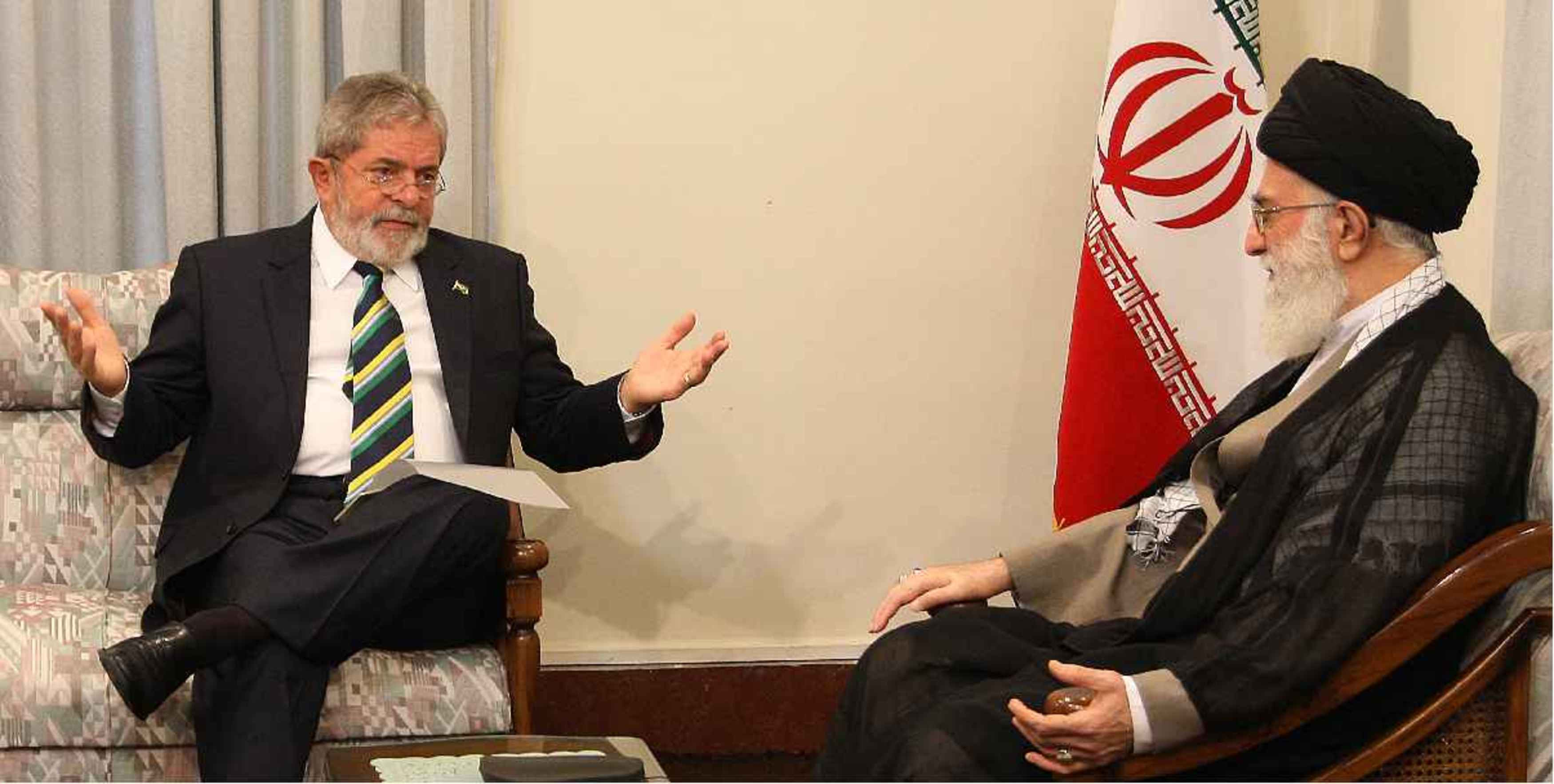 Teerã, Irã - Presidente Luiz Inácio Lula da Silva durante encontro com o Líder Supremo do Irã, Aiatolá Ali Khamenei.